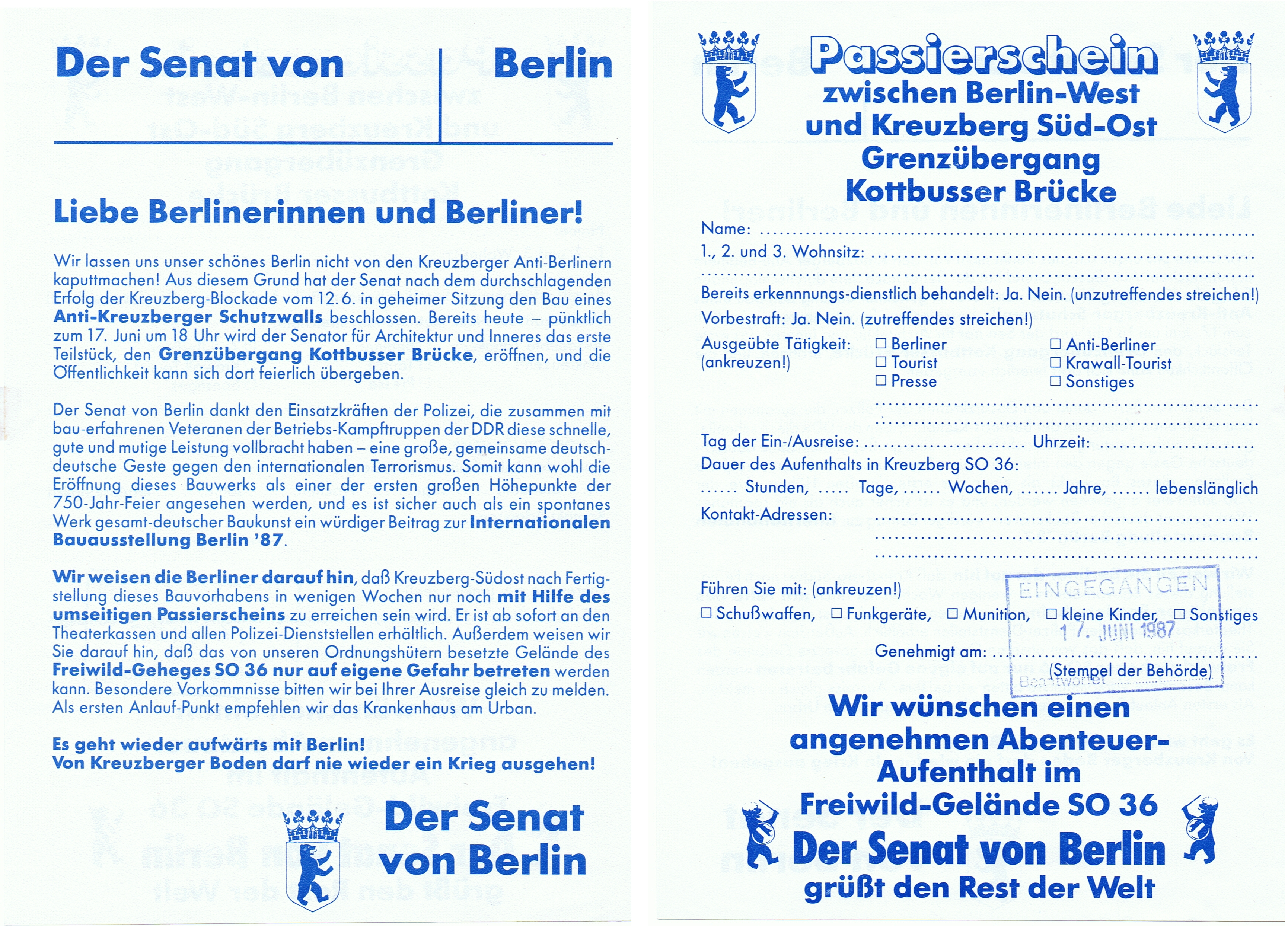 "Passierschein" zur Aktion "Anti Kreuzberger Schutzwall" FDGÖ, Berlin